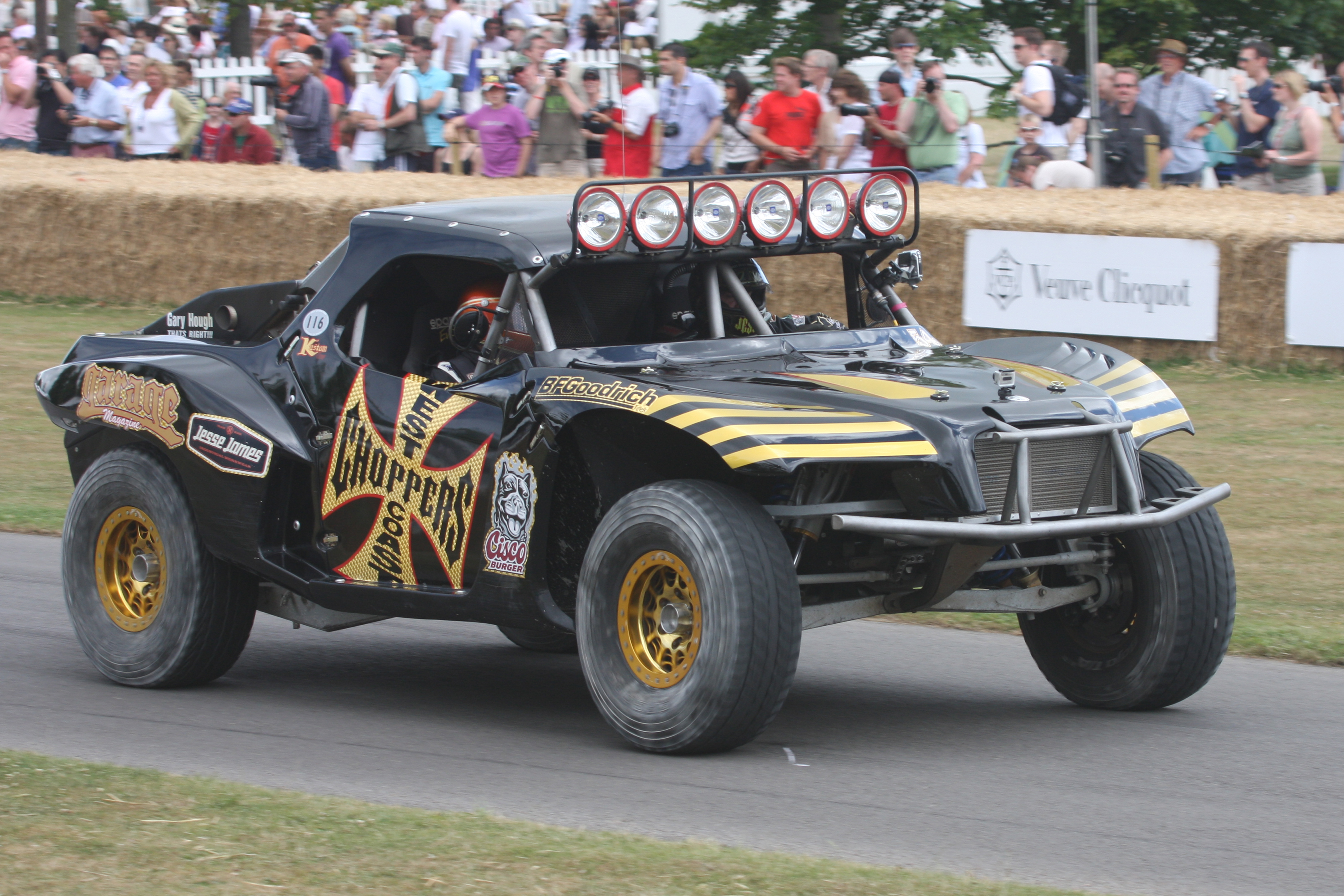 2009 Trophy Truck